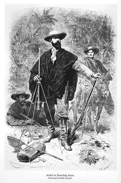 French landscape artist and horticulturist Édouard (Francois) André (1840-1911). Drawing by Emile Bayard (1837-1911), engraved by Charles Barbant (1844-1922), scanned from Bromeliaceae Andreanae (1889) by Édouard André, English translation by Michael Rothenberg, 1983. (Originally published in Ed. André, « L'Amérique équinoxiale : Colombie, Équateur, Pérou », Le Tour du Monde : Journal des Voyages, 1877, XXXIV, 861e liv., p. 9.)